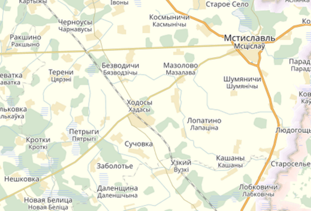 Ходосовский сельсовет